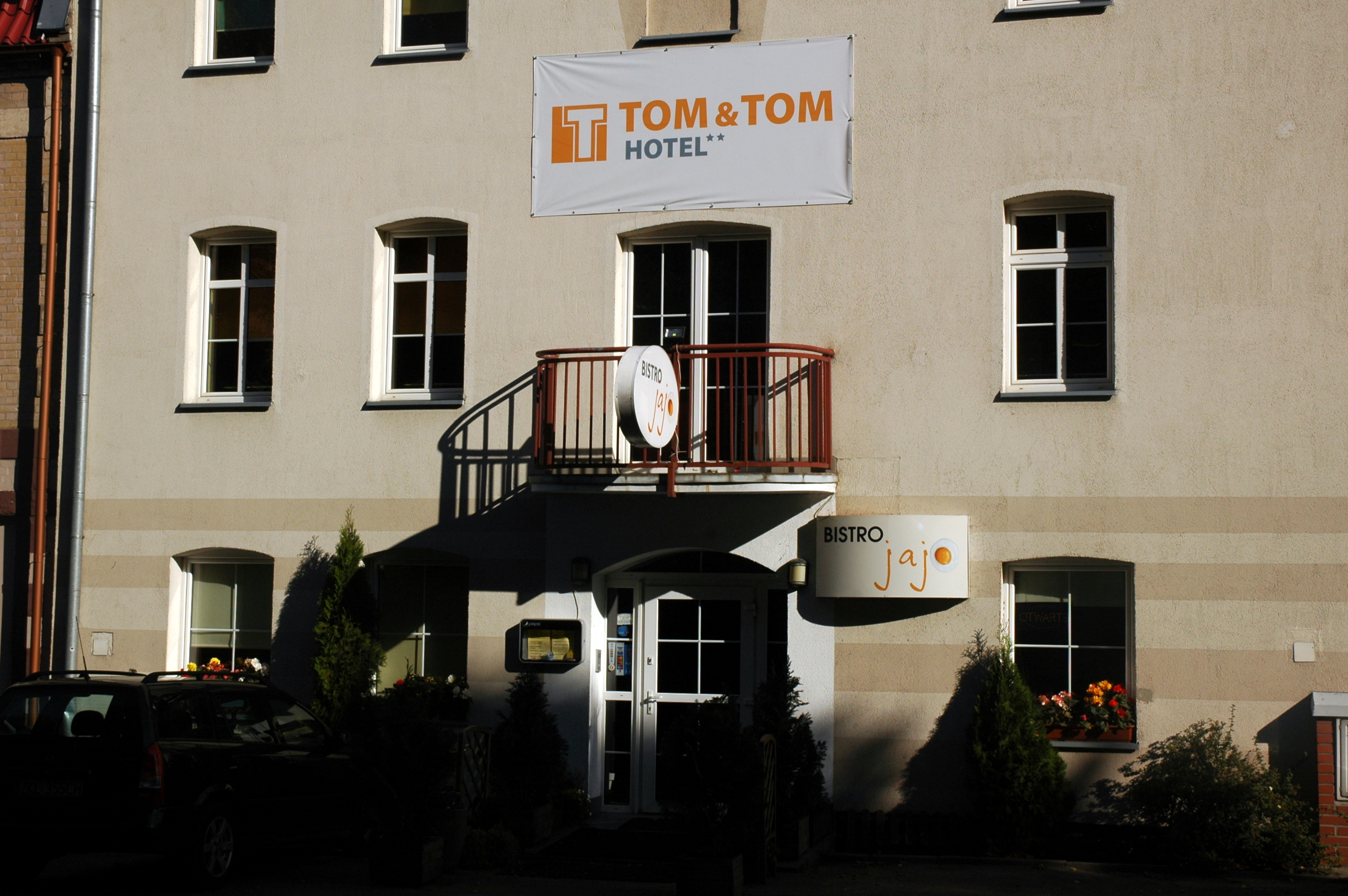 Białogard - Hotel Tom&Tom i Bistro Jajo - 2015-10-11